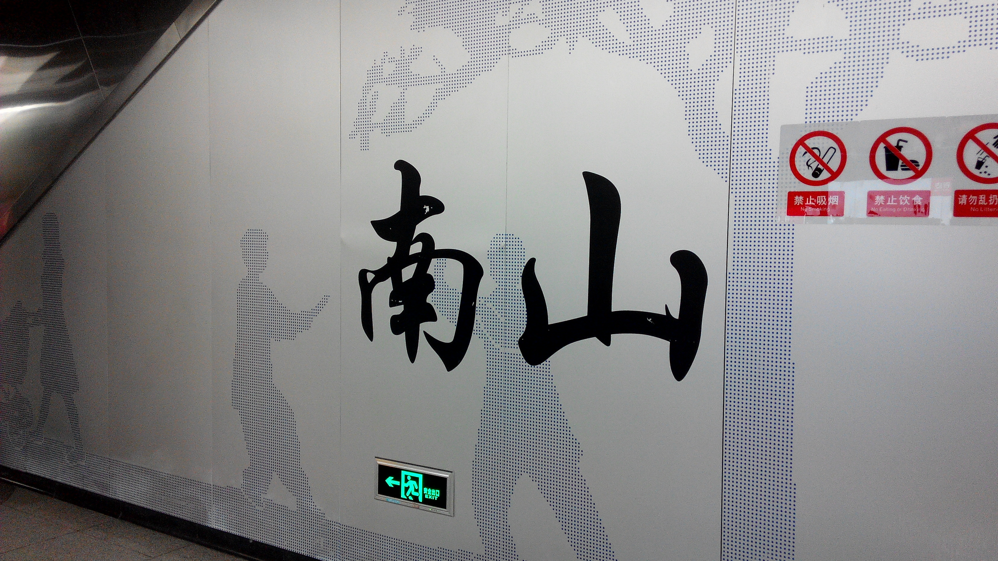 深圳地铁11号线 南山站站台书法字